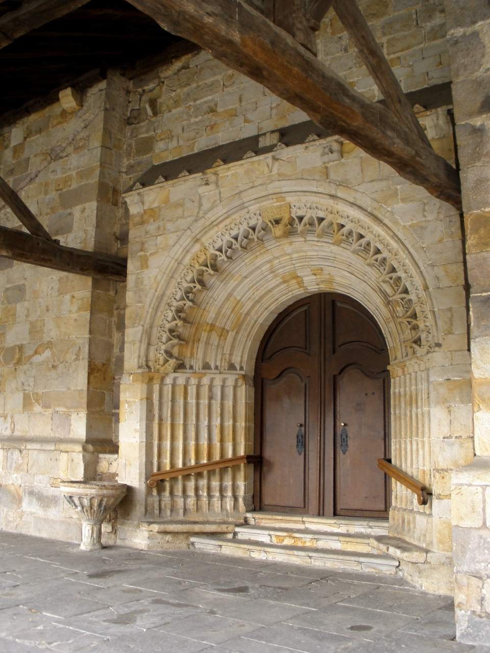 Iglesia de San Andrés, en Ormaiztegi (Gipúzkoa)